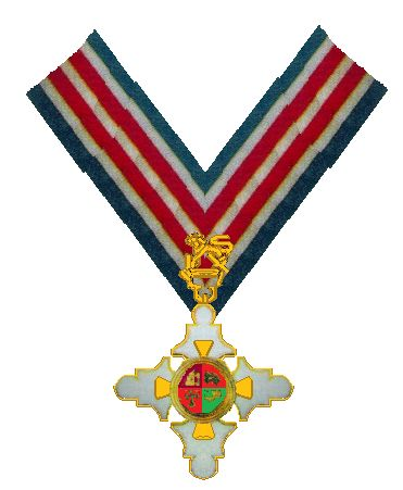 Orde van Verdienste